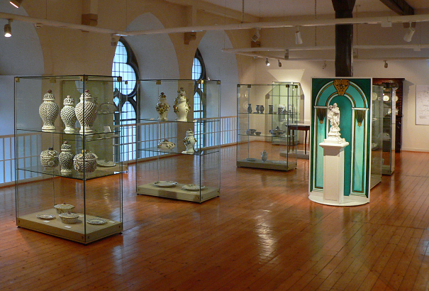 Fayencenausstellung der Fayence-Manufaktur Münden im Museum Münden